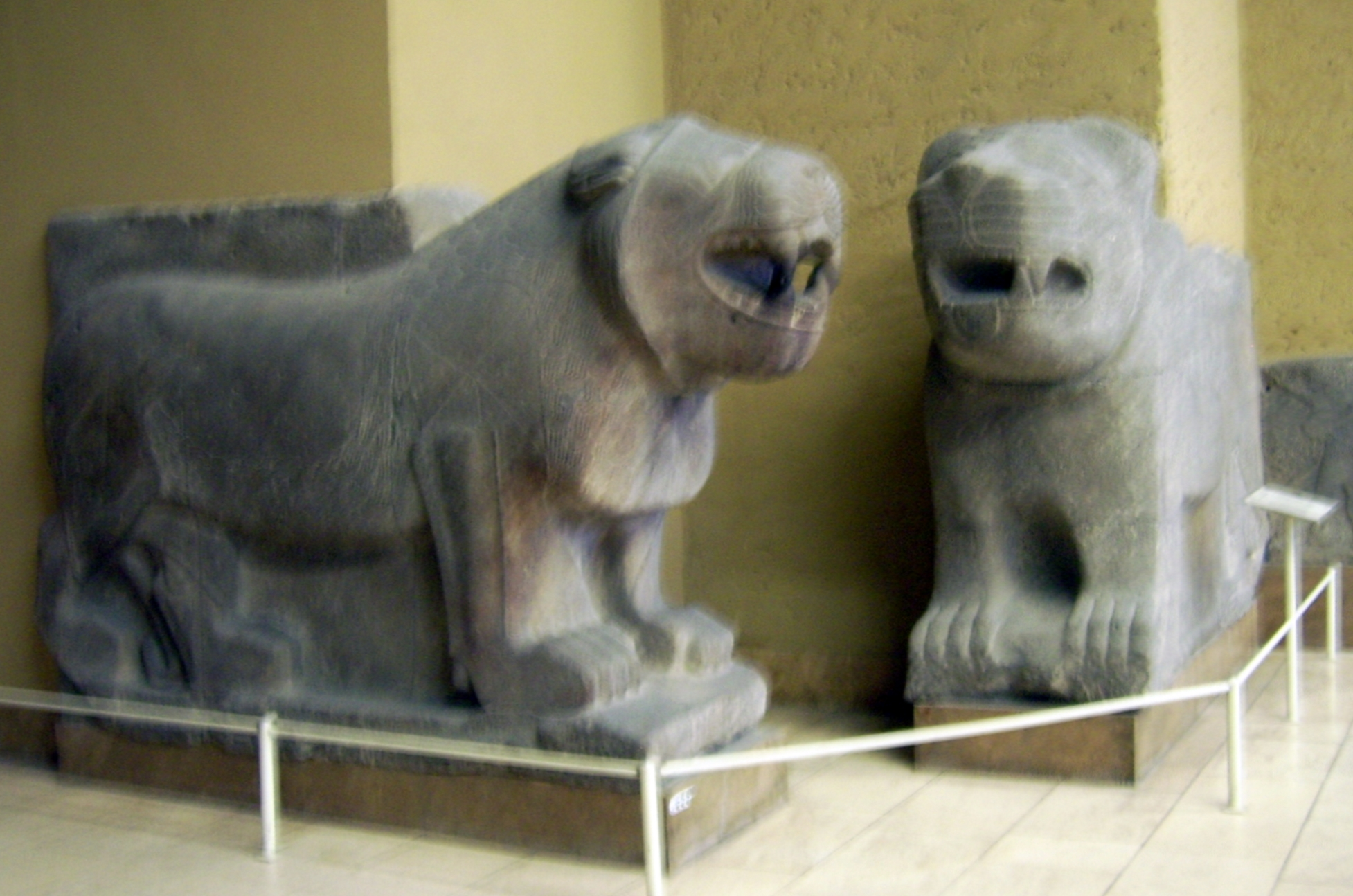 Torlöwen aus Sam'al, Vorderasiatisches Museum Berlin, 10./8. Jahrhundert v. Chr., VAG 1042, VA 2719, VA 2718 und VA 3001